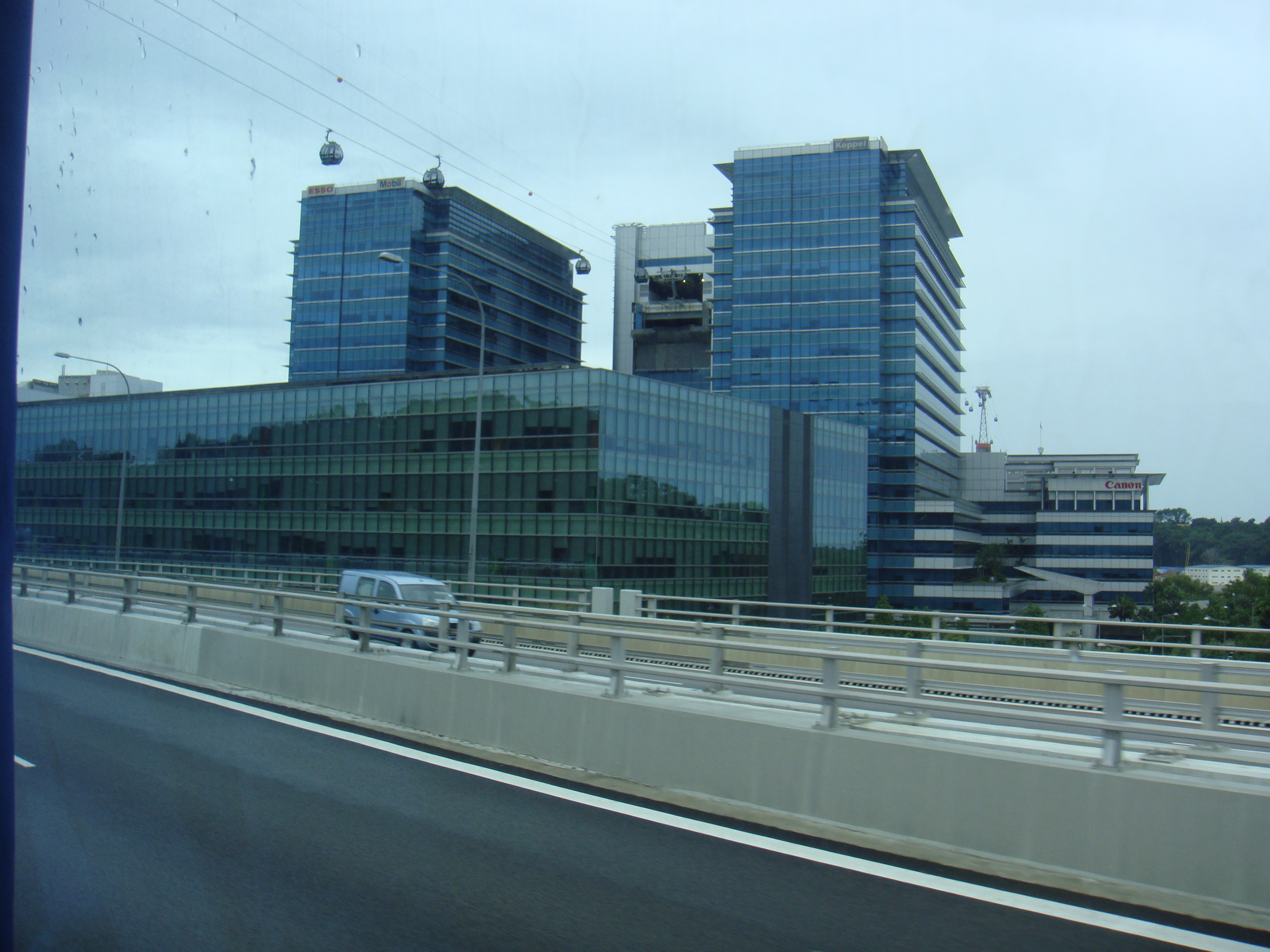 Đường phố tại Singapore.